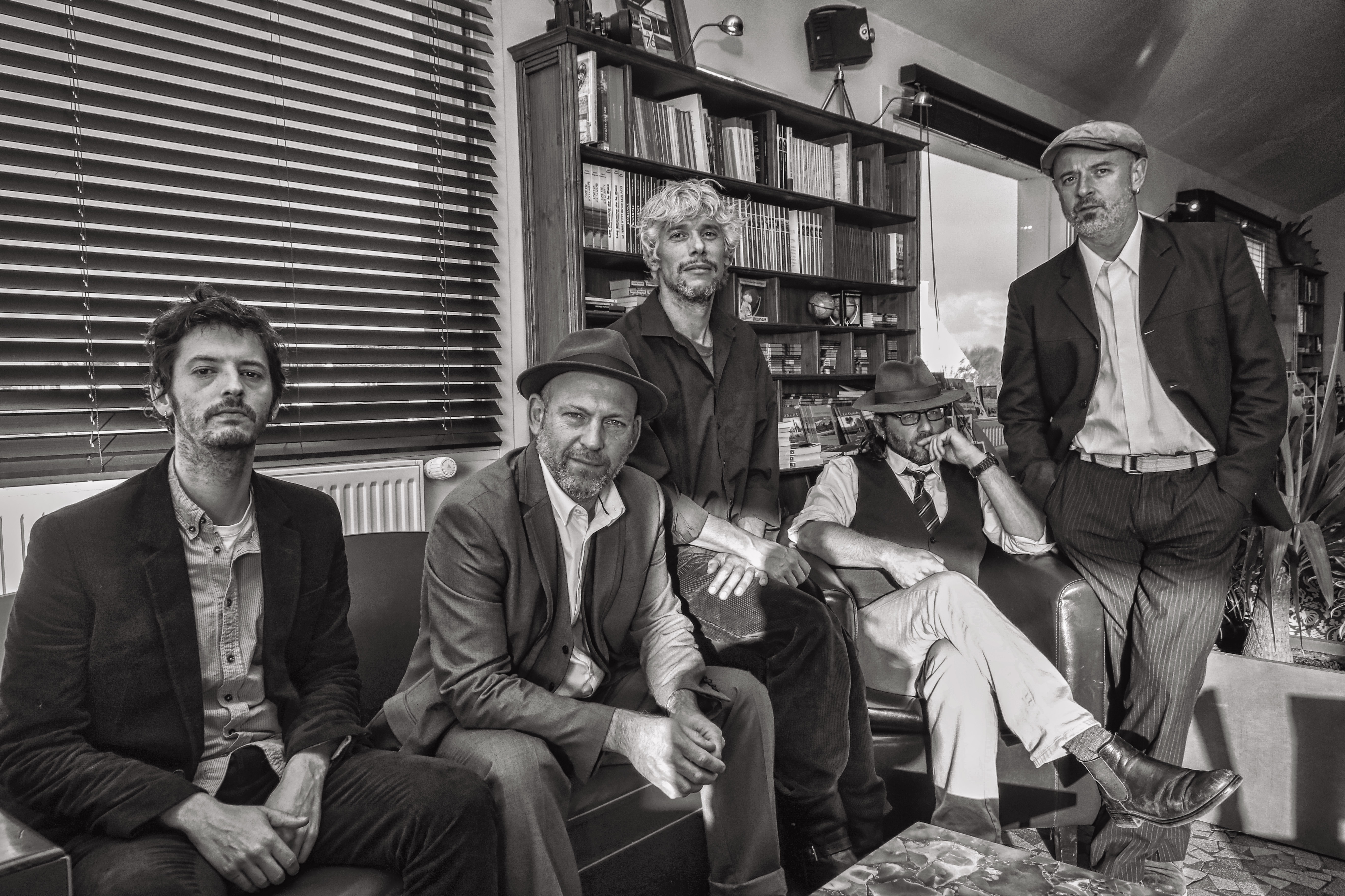 Photo du groupe L'Attirail en 2015